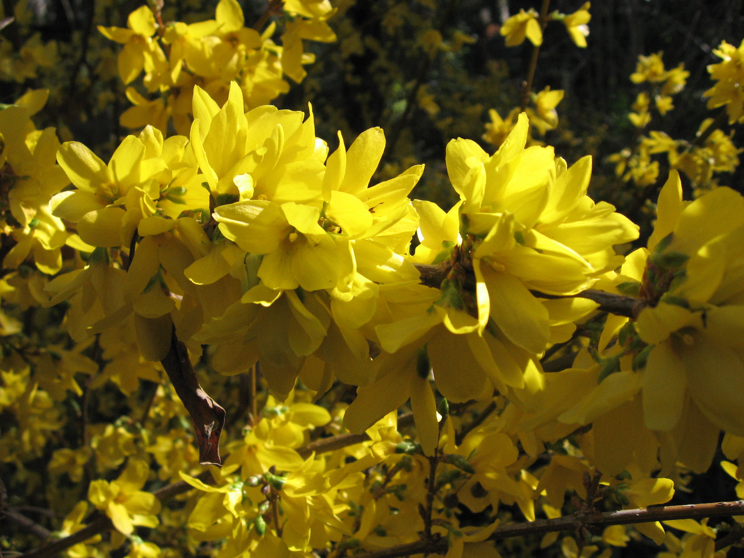 Forsythia x intermedia 'Spectabilis'. Real Jardín Botánico, Madrid